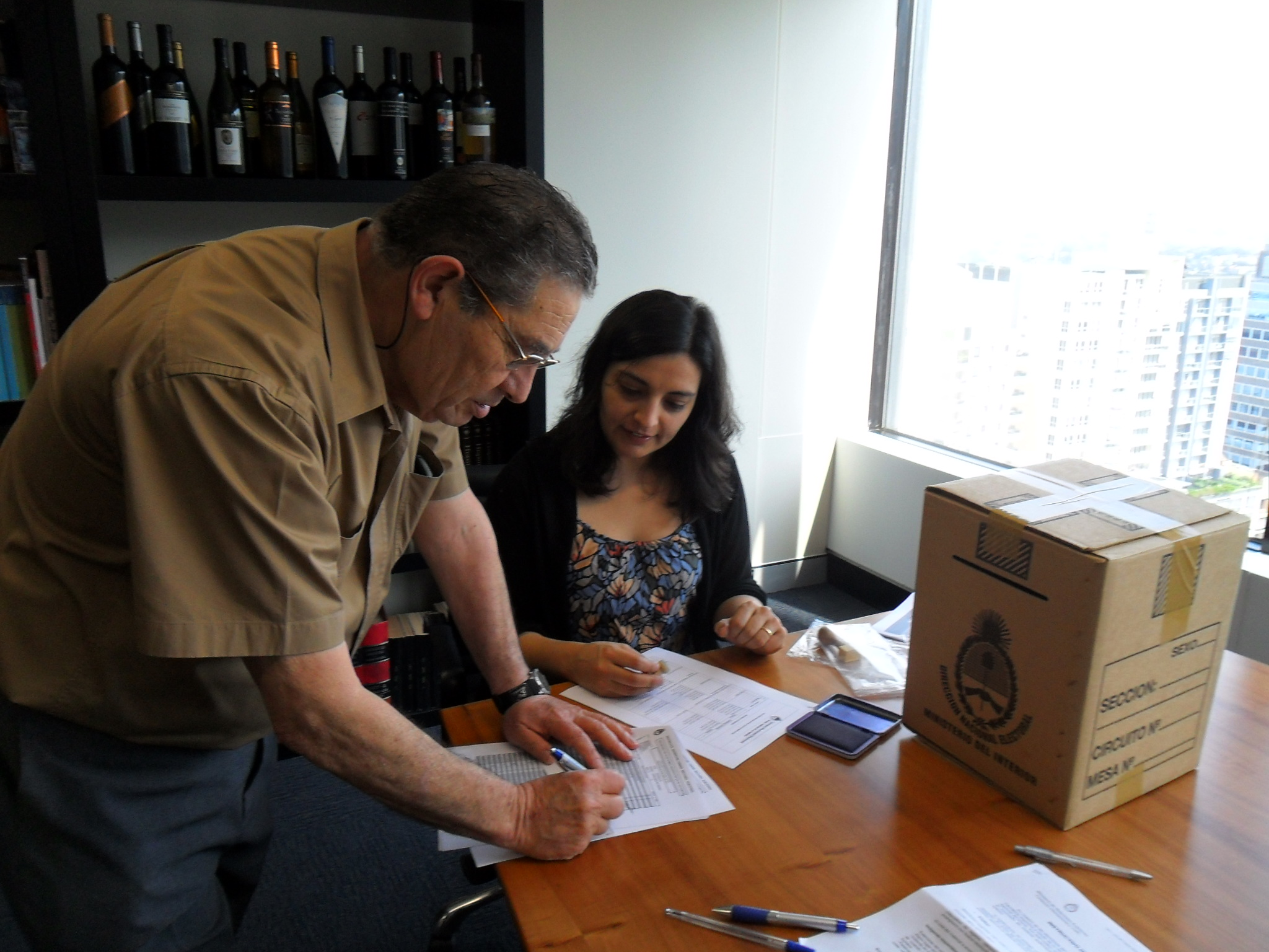 Sydney, Australia. Octubre 23 de 2011. Los argentinos comenzaron a votar desde las 18 hora argentina, por el huso horario 14 horas adelantado al de nuestro país. Ese consulado cuenta con 709 personas empadronadas y se habilitaron dos mesas para votar.